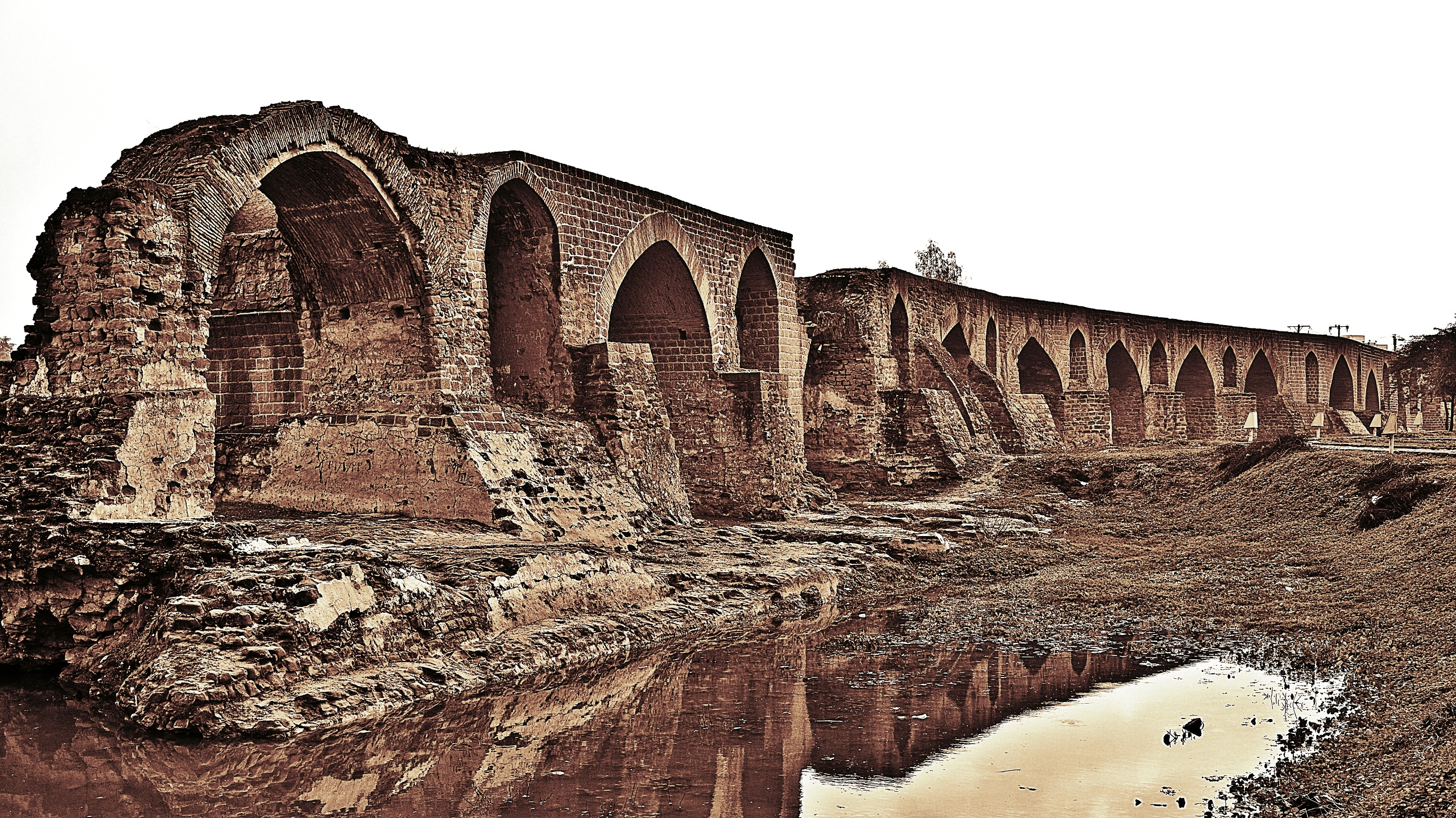 پل معروف به بند قیصر